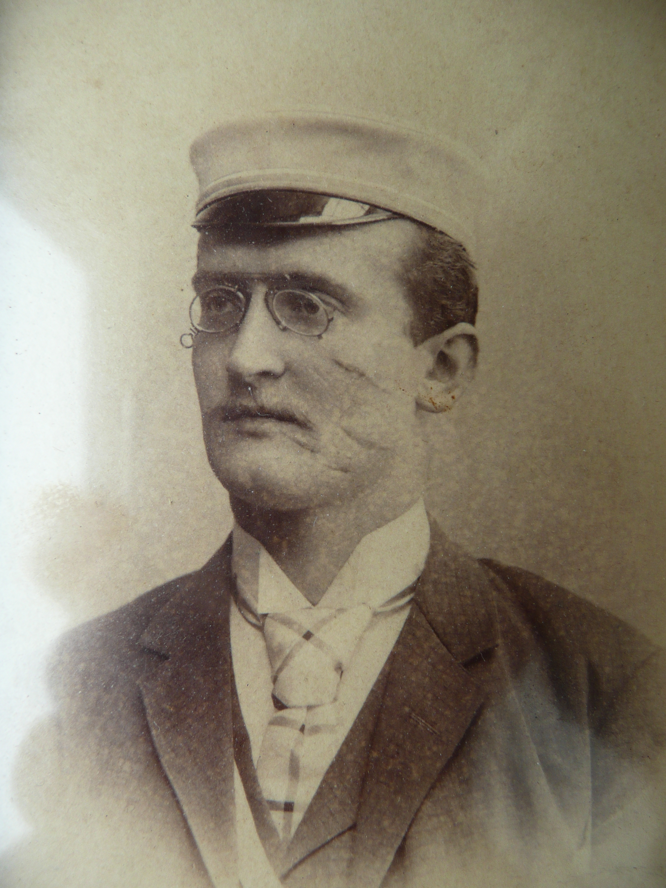 Wilhelm Haberling (1871–1940) als Student beim Corps silesia Breslau